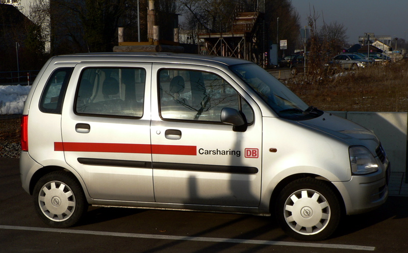 DB-Carsharing Fahrzeuge sind oft auf den ersten Blick zu erkennen und kosten je nach Fahrzeuggruppe unterschiedlich. Hier ein fahrzeug der günstigesten Gruppe beim Bahnhof Ravensburg Autor: Michael Meding Quelle: Selbst fotografiert, 2006